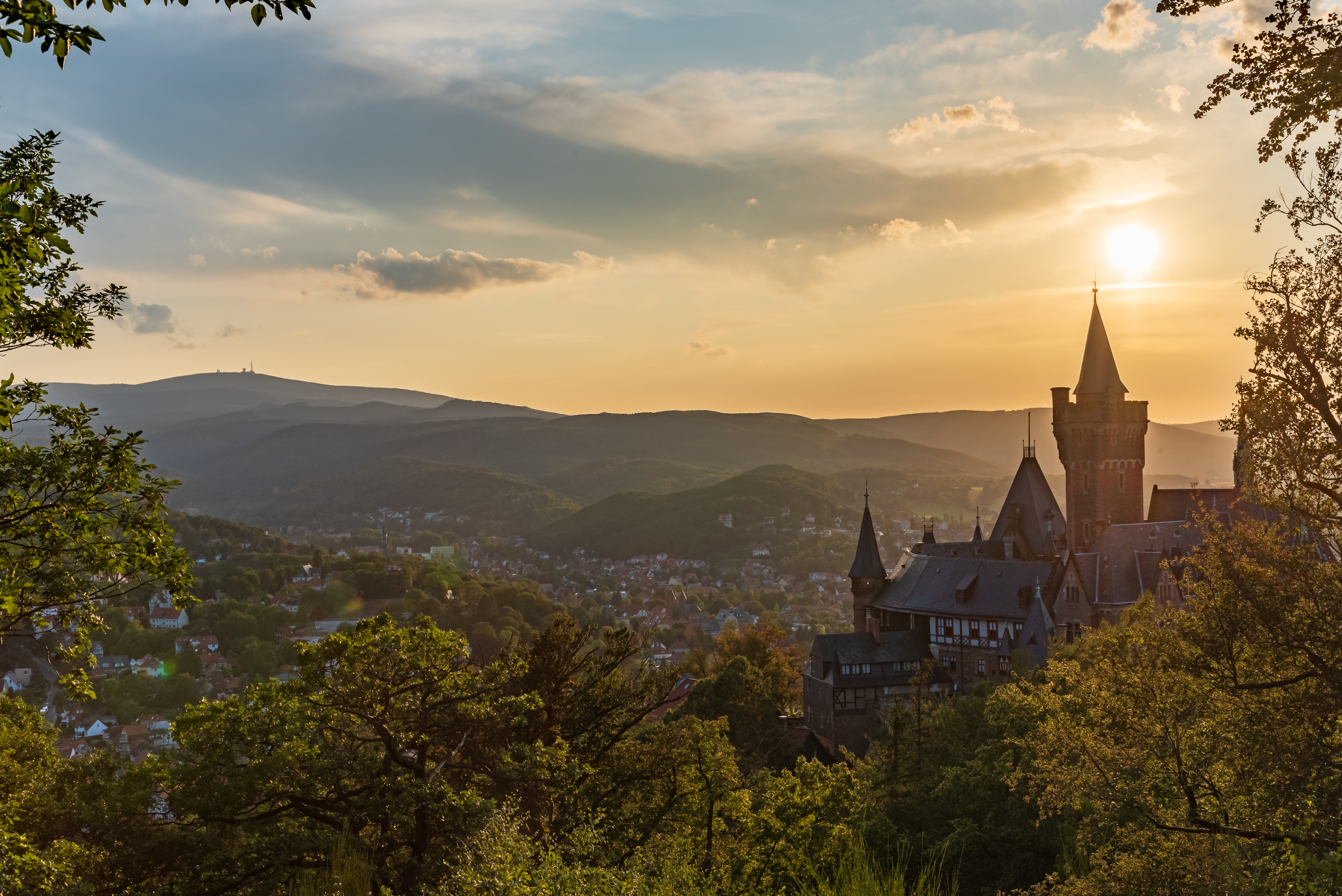 Das Schloß Wernigerode® war ursprünglich eine mittelalterliche Burg, die den Weg der deutschen Kaiser des Mittelalters auf deren Jagdausflügen in den Harz sichern sollte. Im Laufe des 16. Jh. wurde die Burg zu einer Renaissancefestung umgebaut. Im Dreißigjährigen Krieg schwer verwüstet, begann Graf Ernst zu Stolberg-Wernigerode im späten 17. Jahrhundert mit dem barocken Umbau der Burgreste zu einem romantischen Residenzschloss. Den wohl bedeutendsten Umbau in der Geschichte des Schlosses veranlasste Graf Otto zu Stolberg-Wernigerode. Das Schloß Wernigerode® wurde zu einem Leitbau des norddeutschen Historismus. Seit 1930 ist das Schloss in Teilen der Öffentlichkeit zugänglich. Zwei Museumsrundgänge führen die Gäste durch über 40 zum Teil original eingerichtete Wohnräume des deutschen Hochadels.